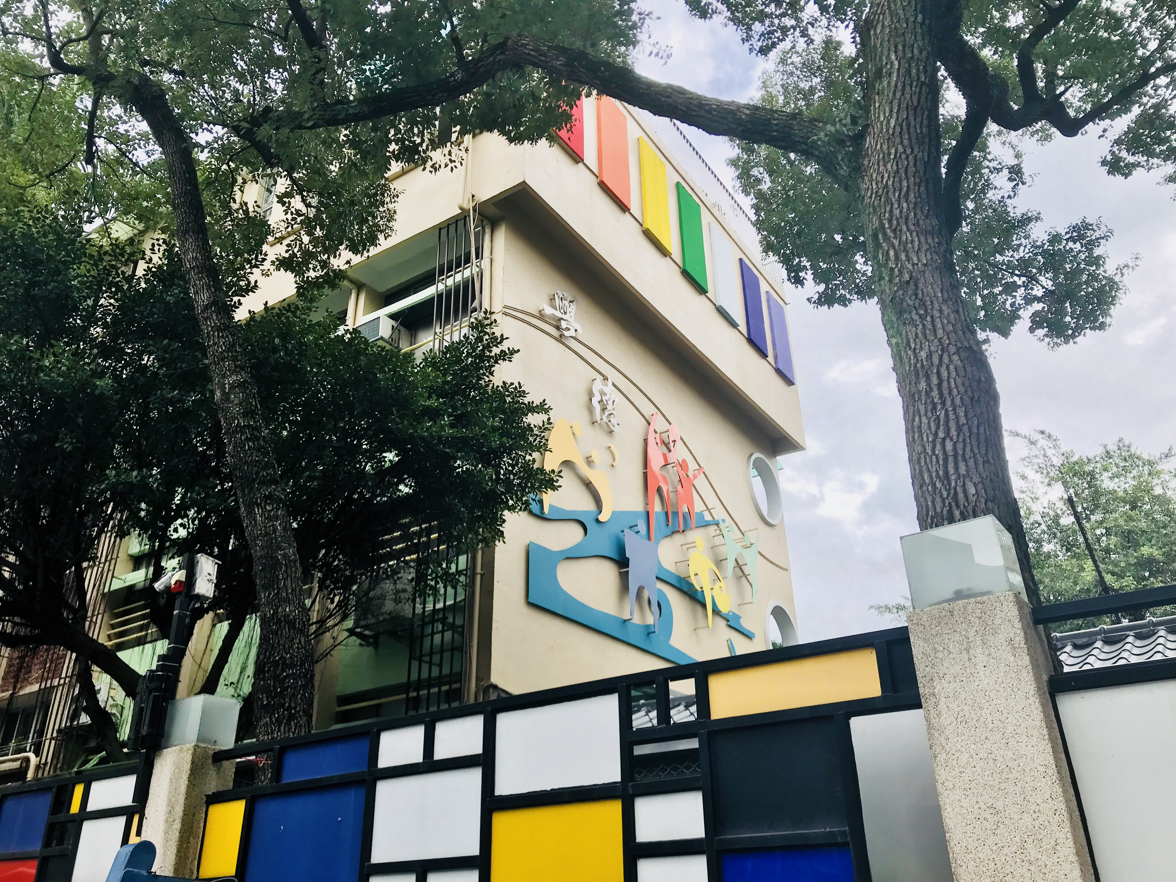 臺北市文山區興德國小的外牆彩繪與大樓